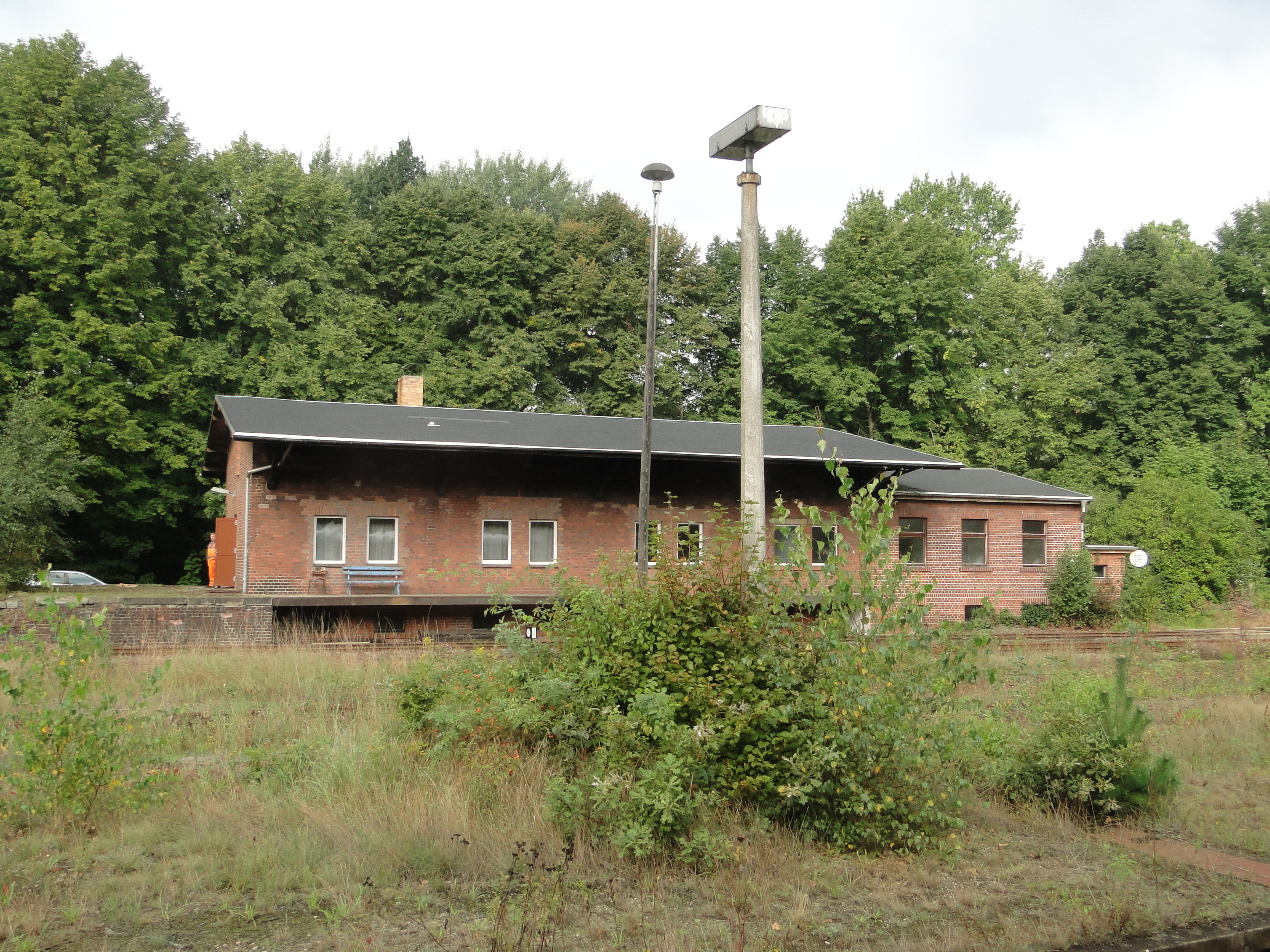 Bahnhof Straßgräbchen-Bernsdorf 2014